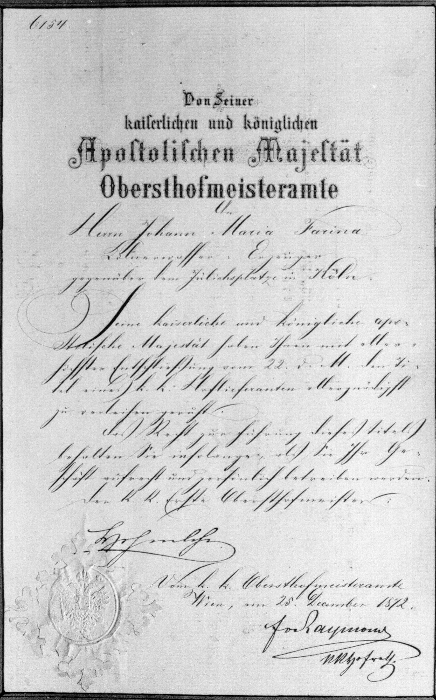 k.u.k Hoflieferanten-Diplom für Johann Maria Farina gegenüber dem Jülichs-Platz